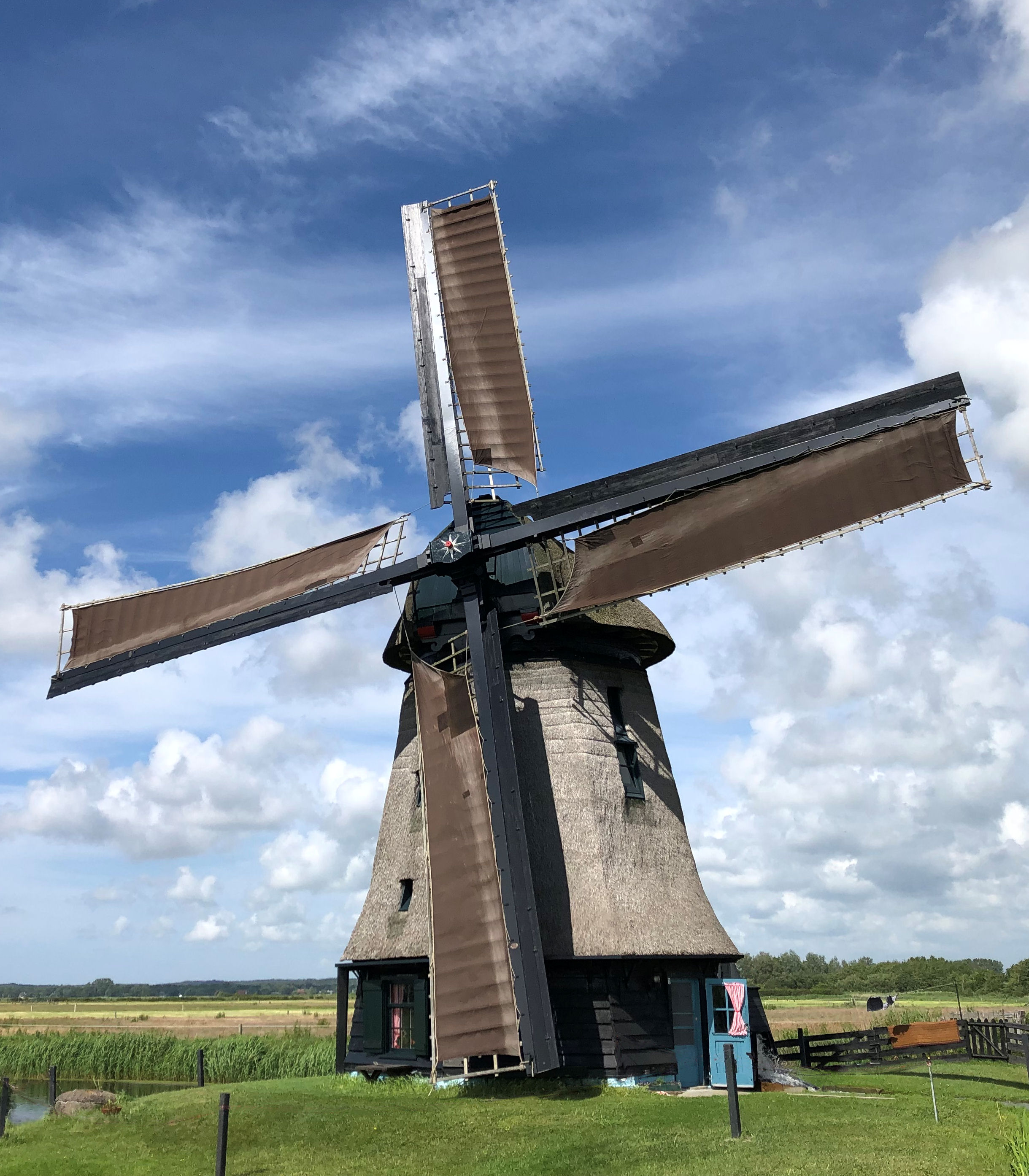 De Wimmenumermolen, Egmond aan den Hoef, 2019